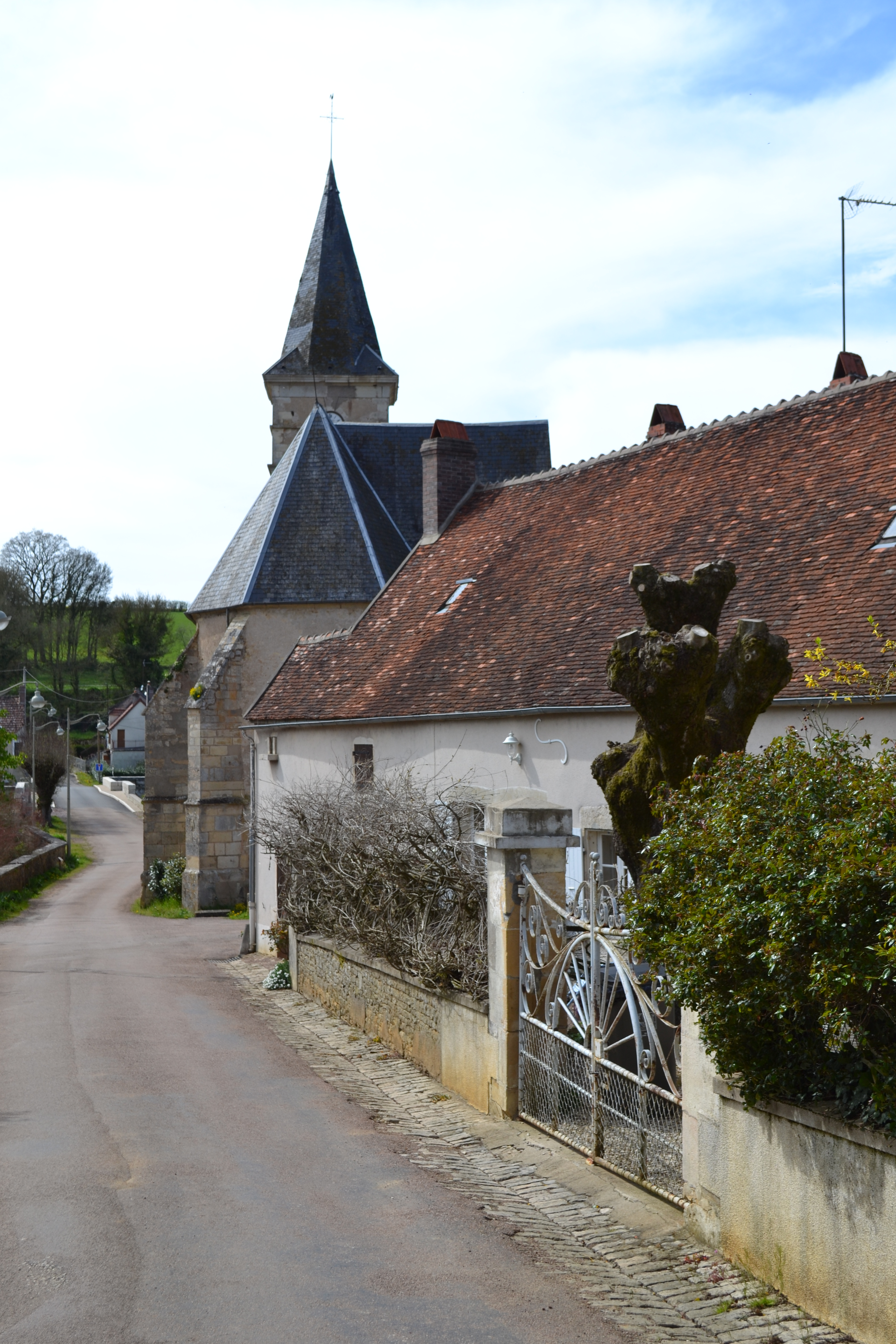 Grand-rue, Ouagne (58).